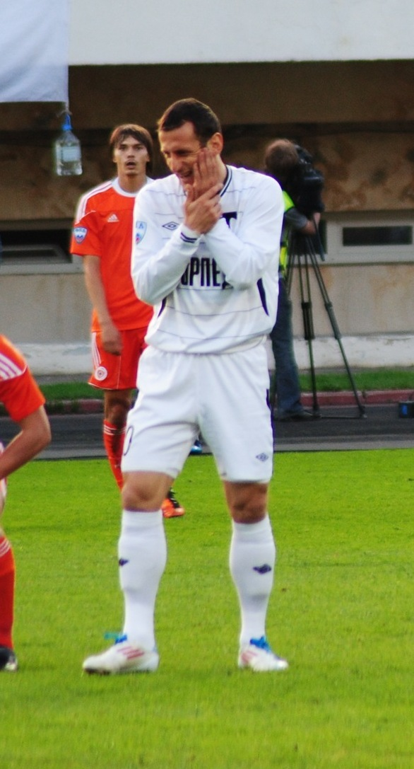 футболист Артим Положани